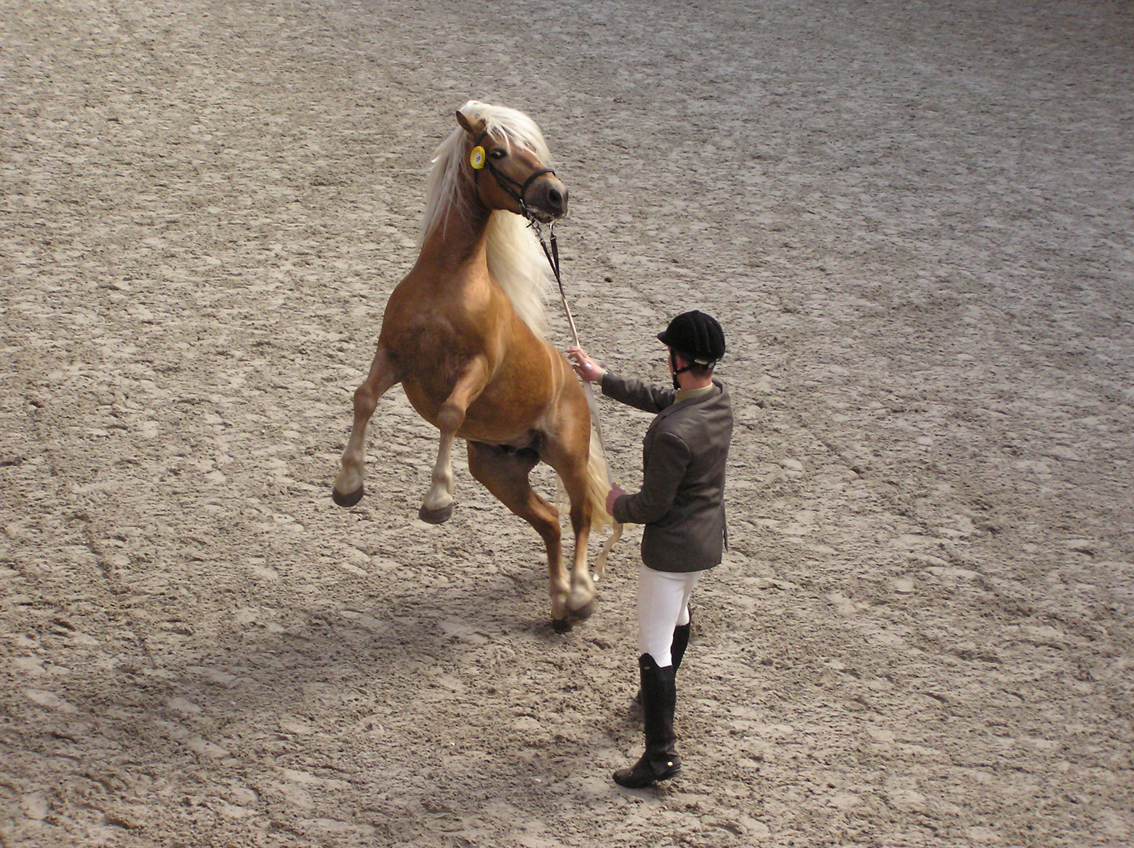 Haflinger